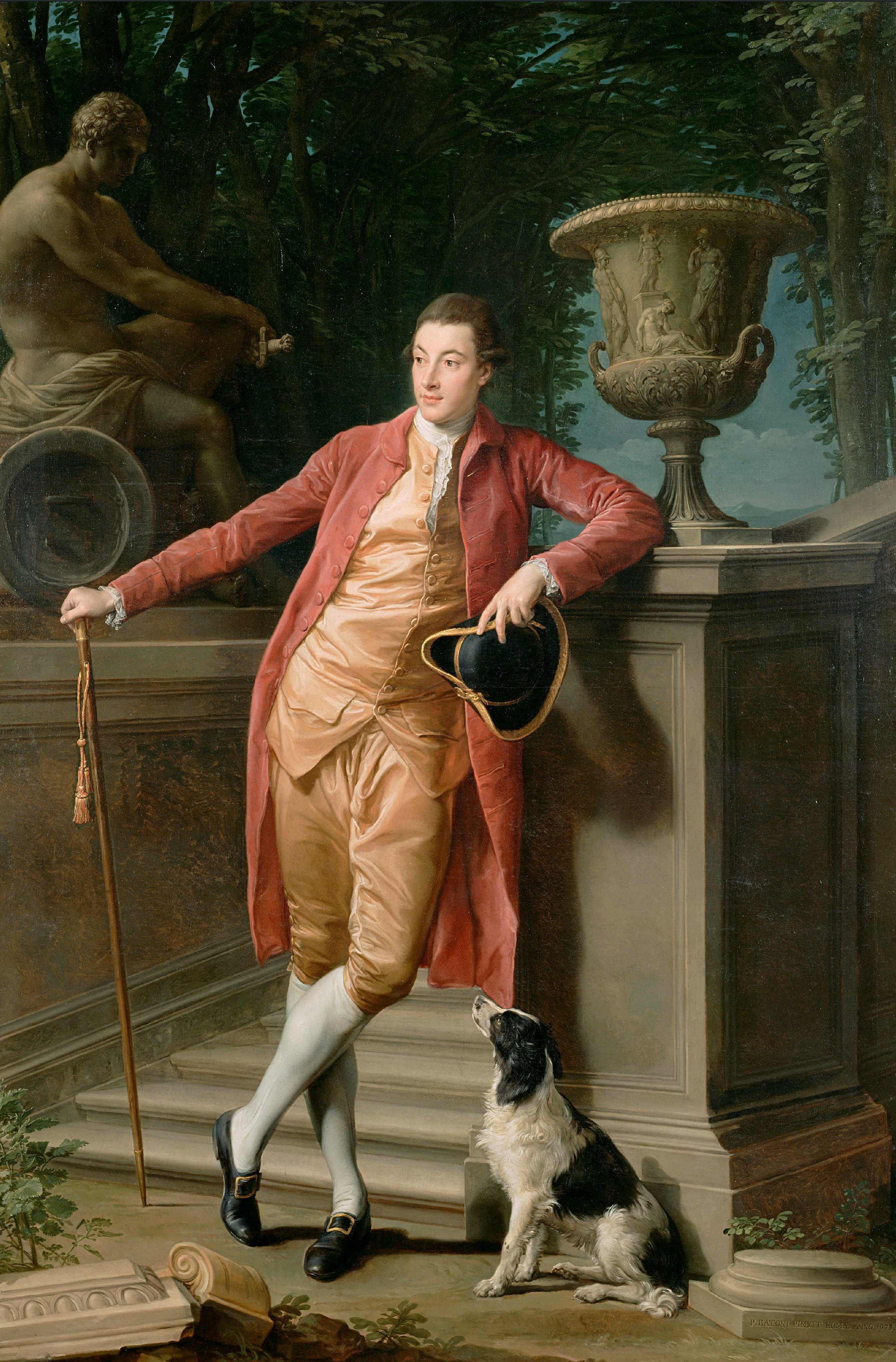 Портрет Джона, первого графа Тэлбота. Музей П.Гетти, Лос Анджелес, штат Калифорния.